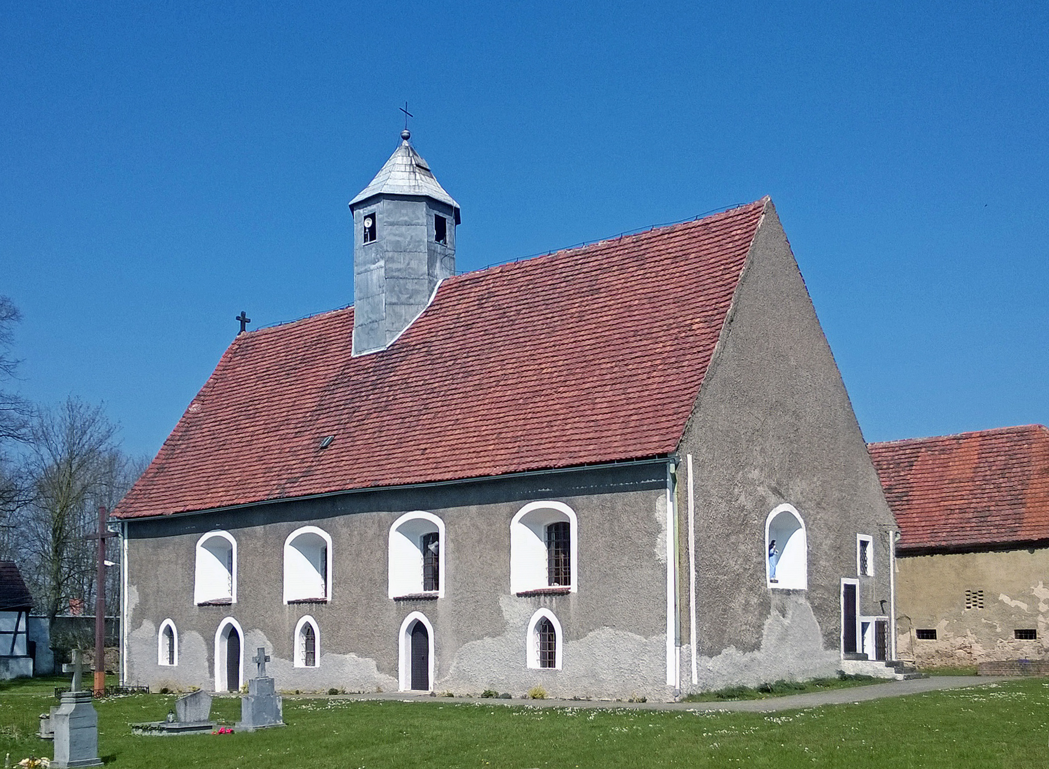 Kirche in Kieslingswalde (Sławnikowice)